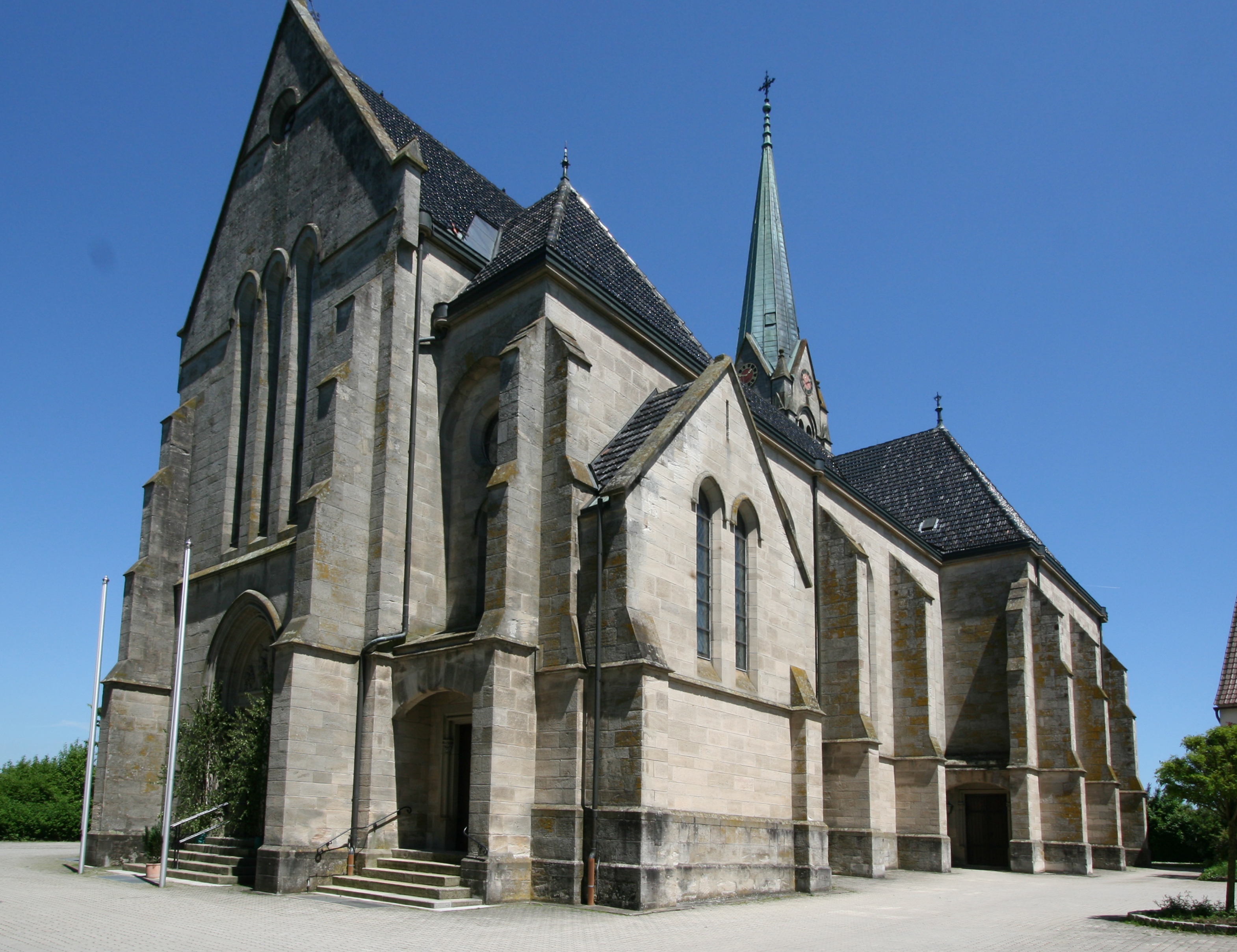 Katholische Kirche St. Peter und Paul in Röhlingen, Stadt Ellwangen